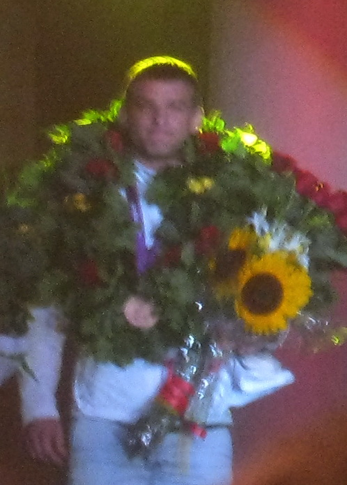 Aleksandr Kazakevič